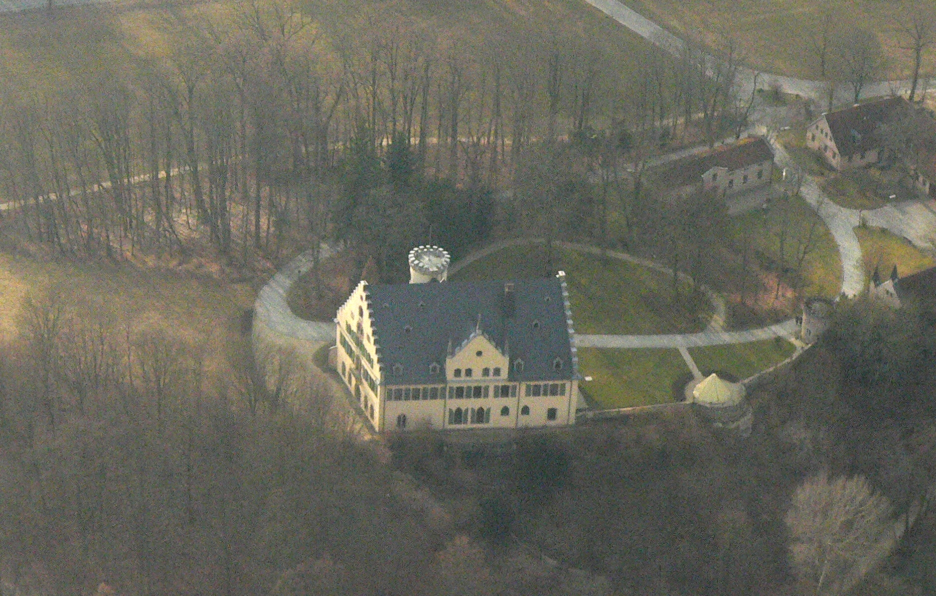 Schloss Rosenau — bei Coburg, Oberfranken, Bayern, DE.